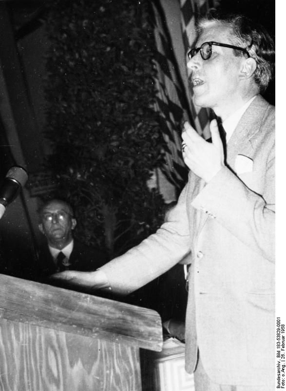 Alexander Schenk v. Stauffenberg Zentralbild 17.3.1958 44 westdeutsche Professoren appelieren an Gewerkschaften: Gemeinsam für atomwaffenfreie Zone 4 Universitäts- und Hochschulprofessoren der Bundesrepublik veröffentlichten am 26. Februar 1958 einen Appell für die Schaffung einer atomwaffenfreien Zone und gegen die Atomaufrüstung, der sich besonders an die westdeutschen Gewerkschaften wendet und sie zu gemeinsamen Aktionen aufruft. UBz: Prof. Dr. Alexander Schenk von Stauffenberg, einer der Unterzeichner des Appells. Abgebildete Personen: Stauffenberg, Alexander Schenk von Prof. Dr.: Wissenschaftler, Bundesrepublik Deutschland